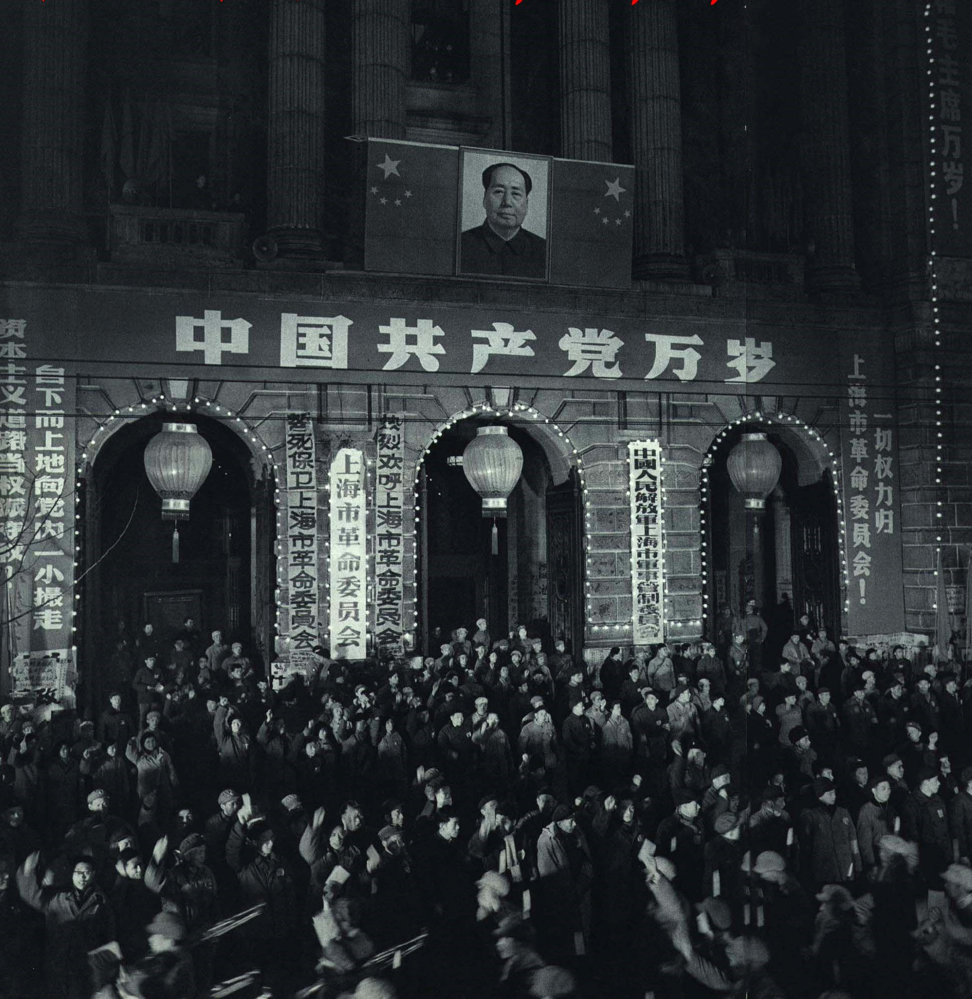 1967-11 1967年11月 1967年上海市革委会成立